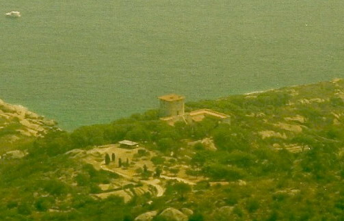 La Torre del Lazzaretto sull'Isola del Giglio; foto scattata da apparecchio non digitale e modificata successivamente